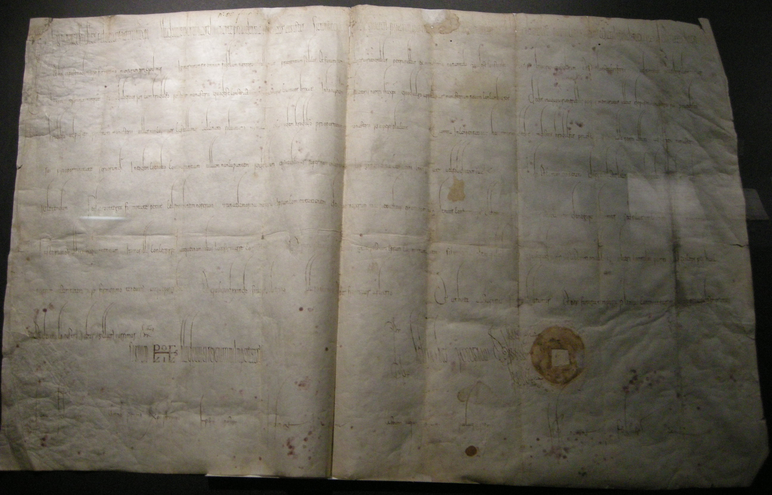 Museo diocesano nonantola, ludovico il pio conferma una permuta tra pietro abate di nonantola e rodolfo di san salvatore a brescia, anno 814